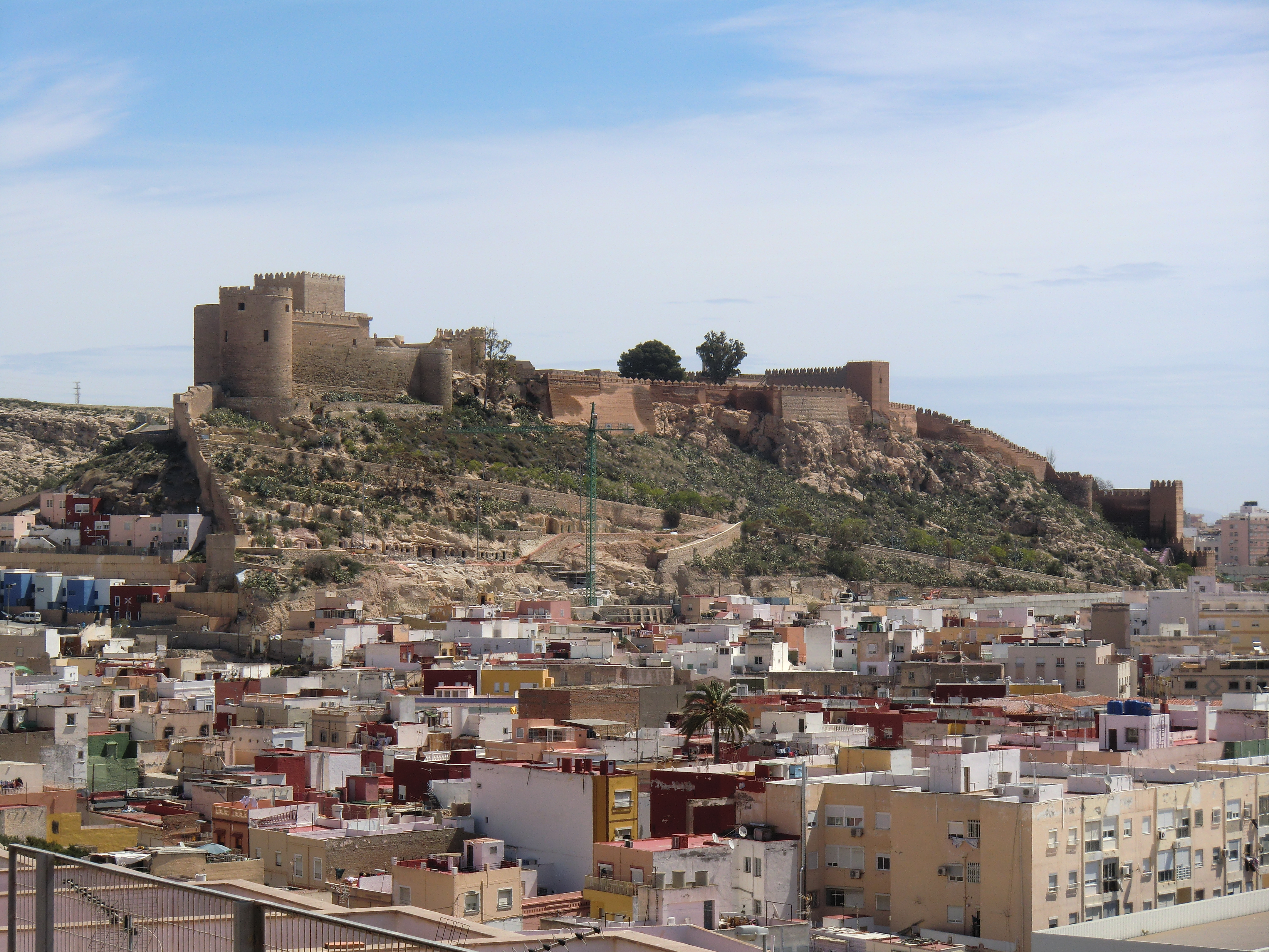 Foto en La Chanca